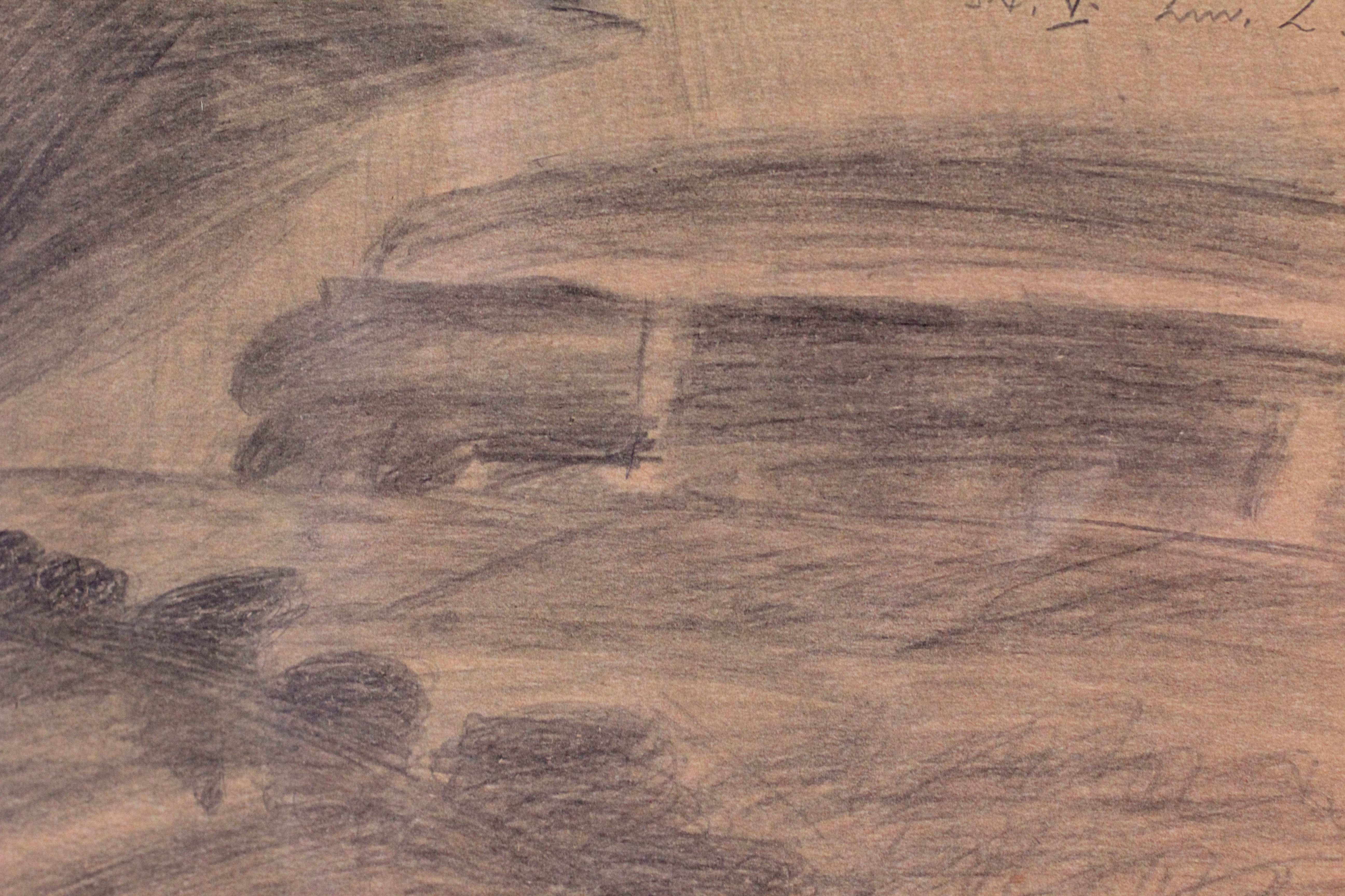 Barnetegning i Terezin.